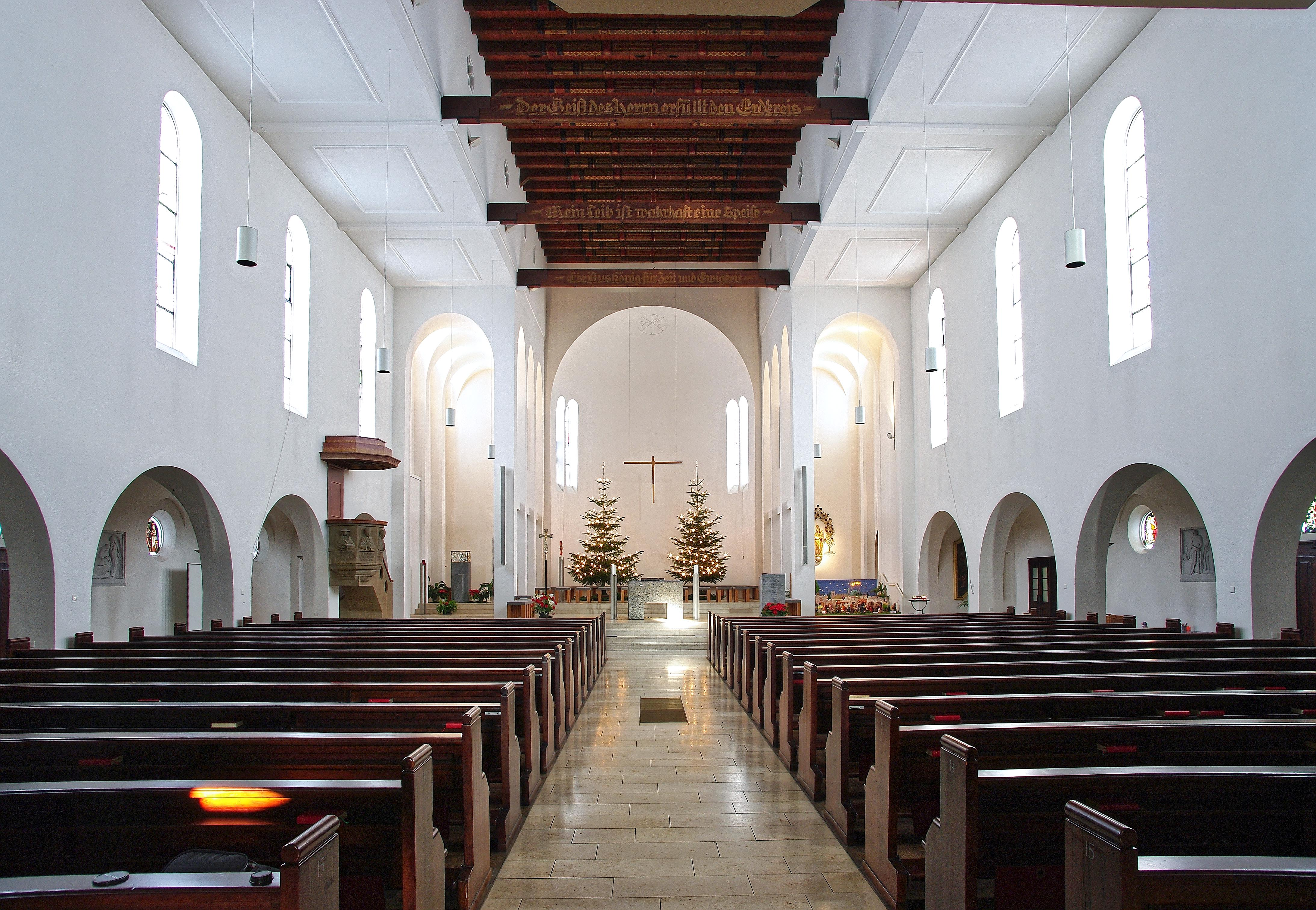 St. Urban